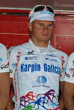 Eduard Vorganov. Karpin-Galicia, Euskal Bizikleta 2008